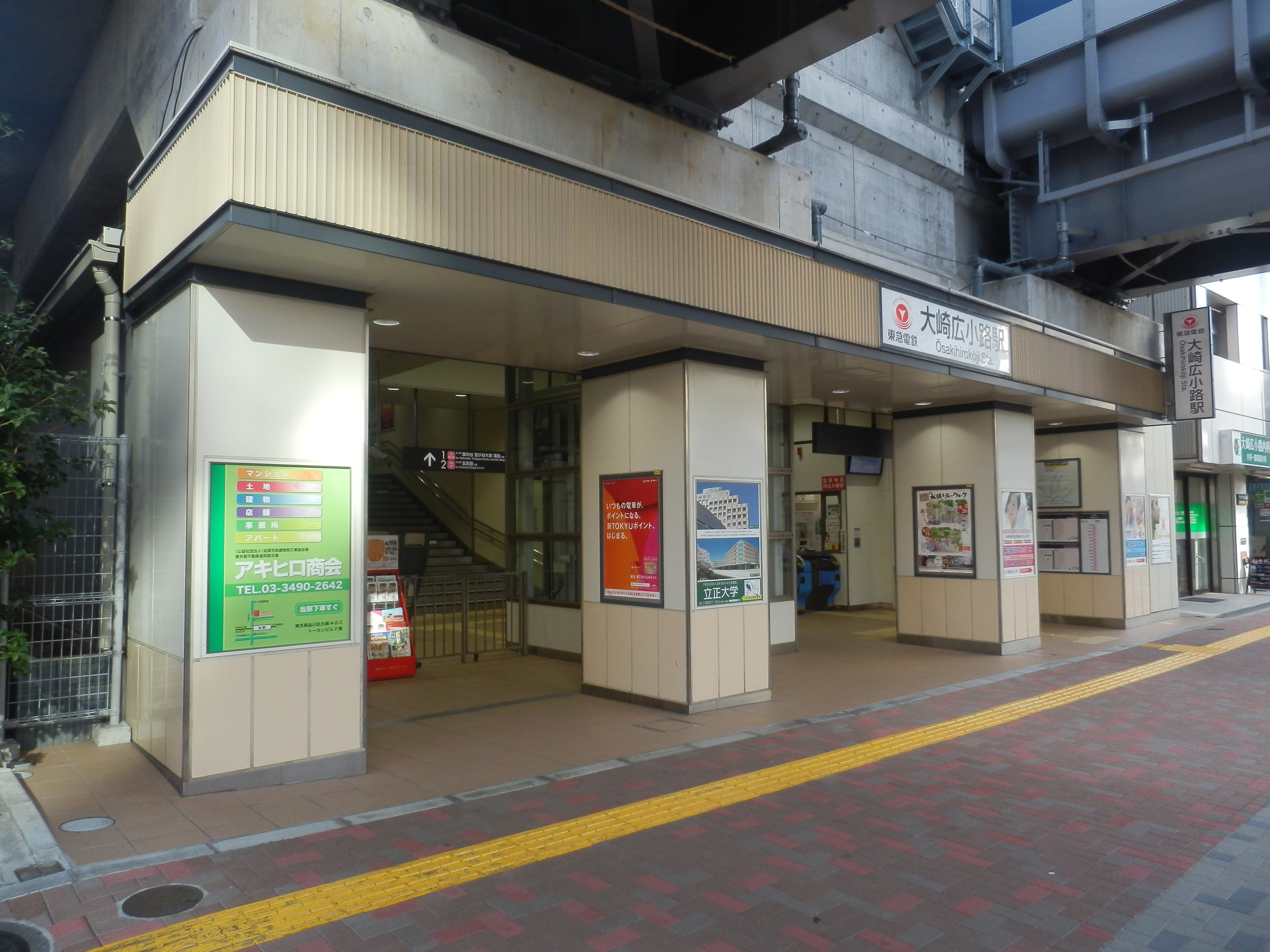 駅入口（2015年10月）